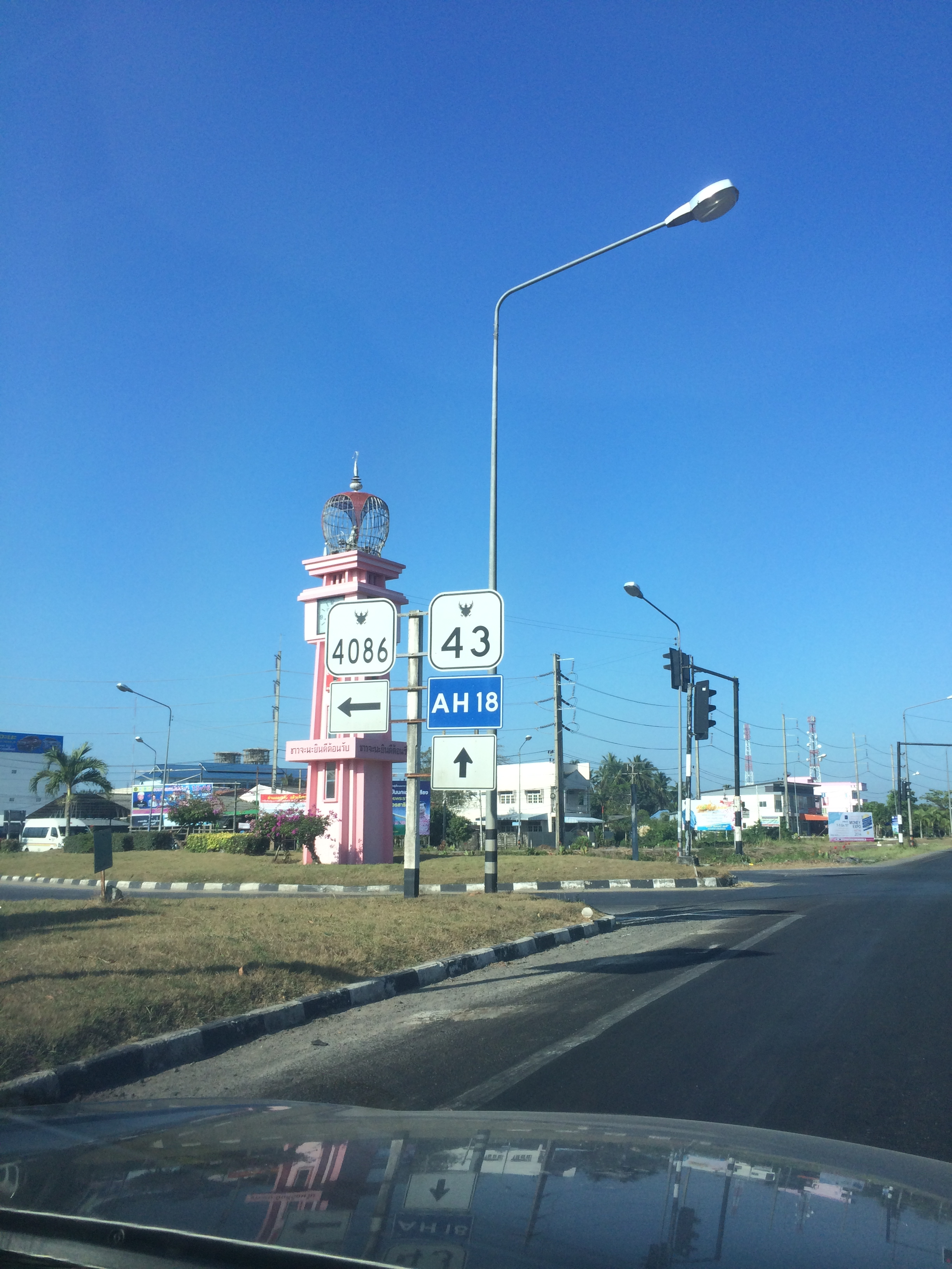 Ban Na, Chana District, Songkhla, Thailand